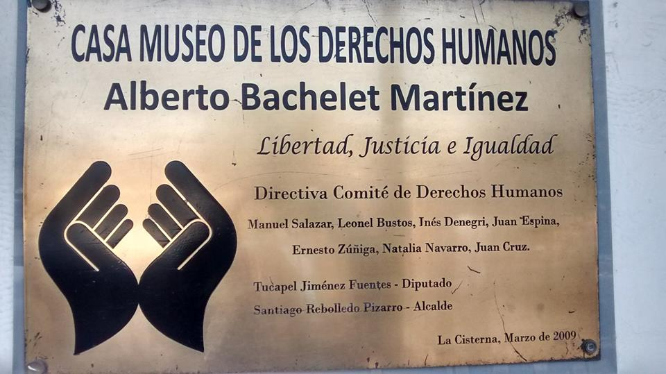 El Museo Centro Clandestino de detención y tortura "Nido 20", se encuentra ubicado en la comuna de La Cisterna, Chile. Usado por el Comando Conjunto, célula represora formada por elementos perteneciente a la Fuerza Aérea y Carabineros de Chile.